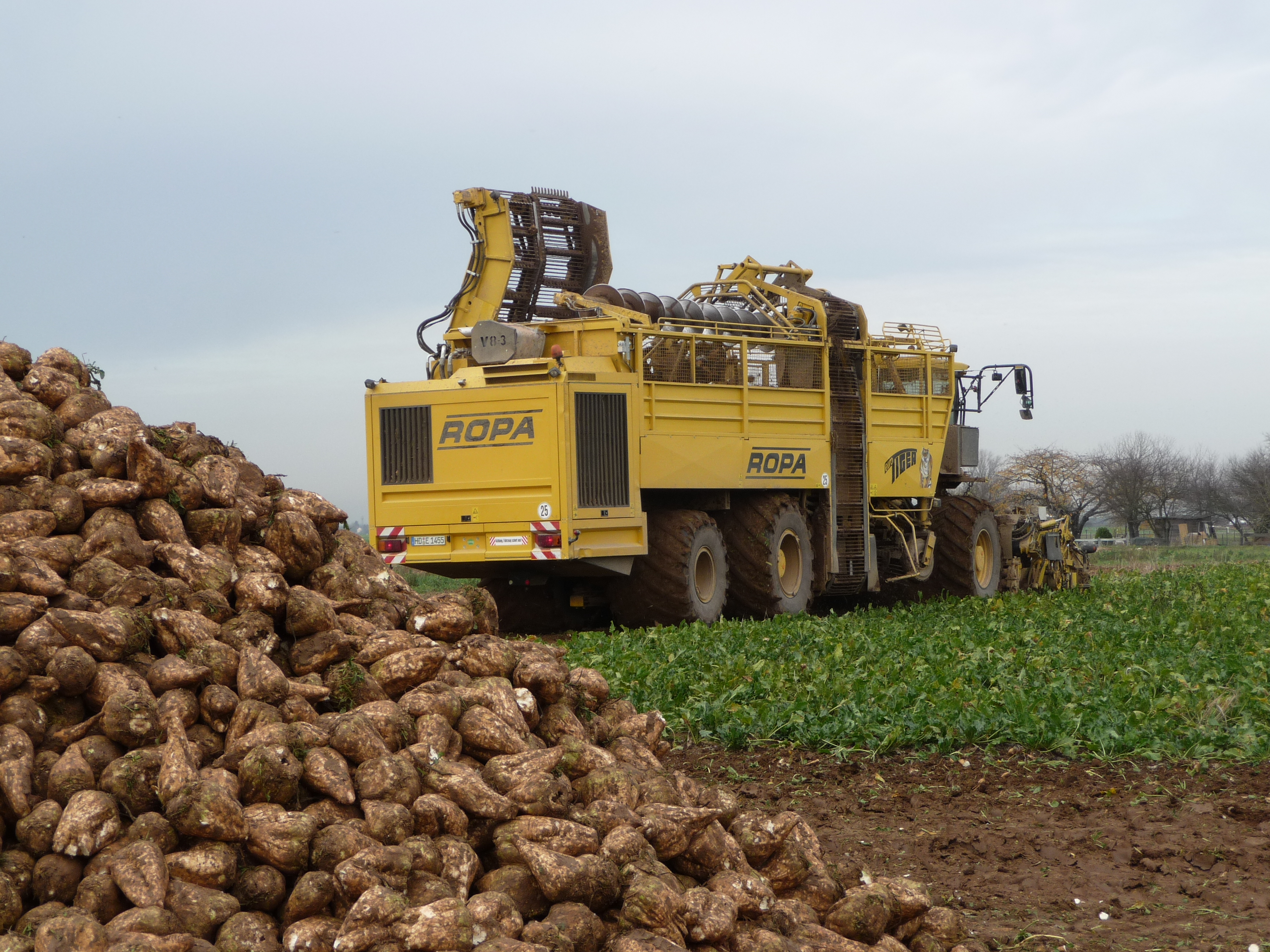 Zuckerrübenvollernter ROPA euro-tiger V8-3, aufgenommen im Rhein-Neckar-Kreis (Baden-Württemberg, Deutschland); DaimlerChrysler V8 Dieselmotor mit 436kw (604 PS), Länge 14,95 m, Höhe 4 m, Leistungskapazität bis 2ha/Stunde, Bunker mit 40 m³ Ladevolumen, Entladung binnen 60 Sekunden